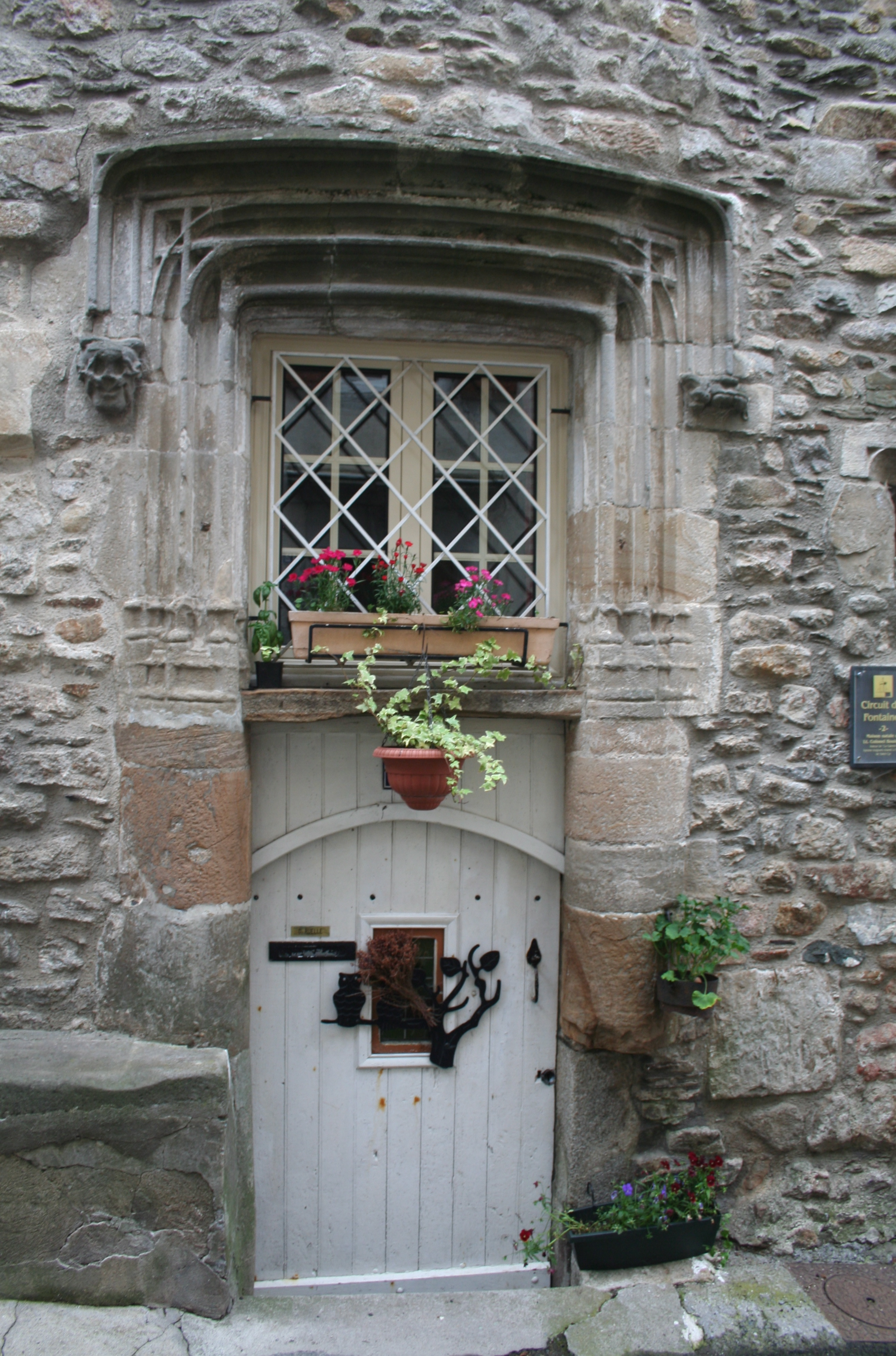 Lacaune (Tarn) - porte de la maison natale du Lieutenant-Colonel Bouisset (1824-1900), auteur du chant de La Galette.